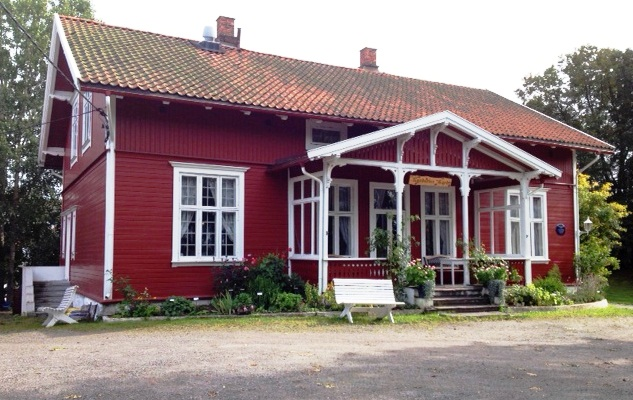 Hovedhuset på Nordseter Gård i Oslo slik det står i 2012